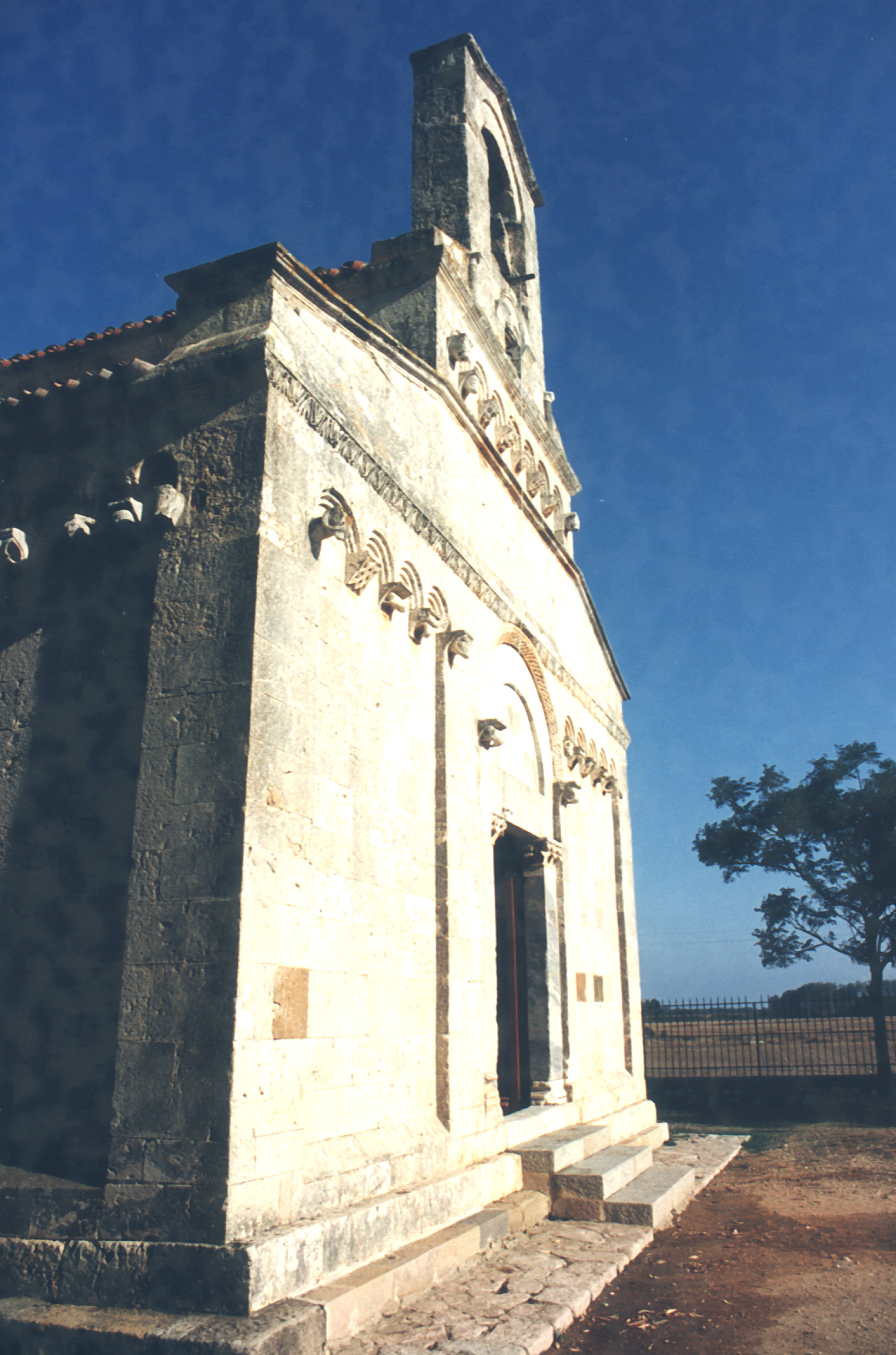 Chiesa di Santa Maria (XII secolo), Uta (CA), Sardegna